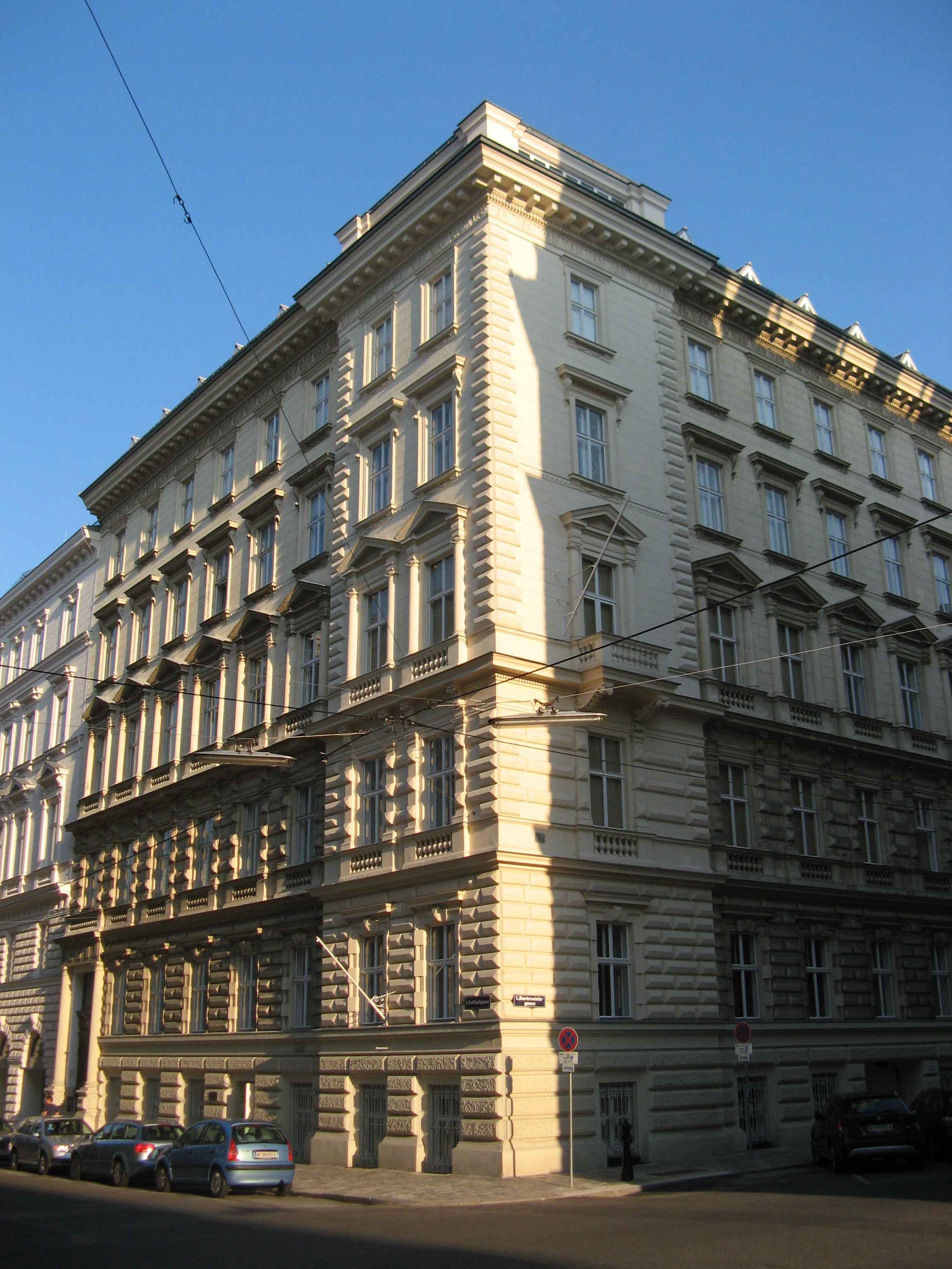 Haus (1874-75) von Wilhelm Stiassny, Doblhoffgasse 3, Wien-Innere Stadt